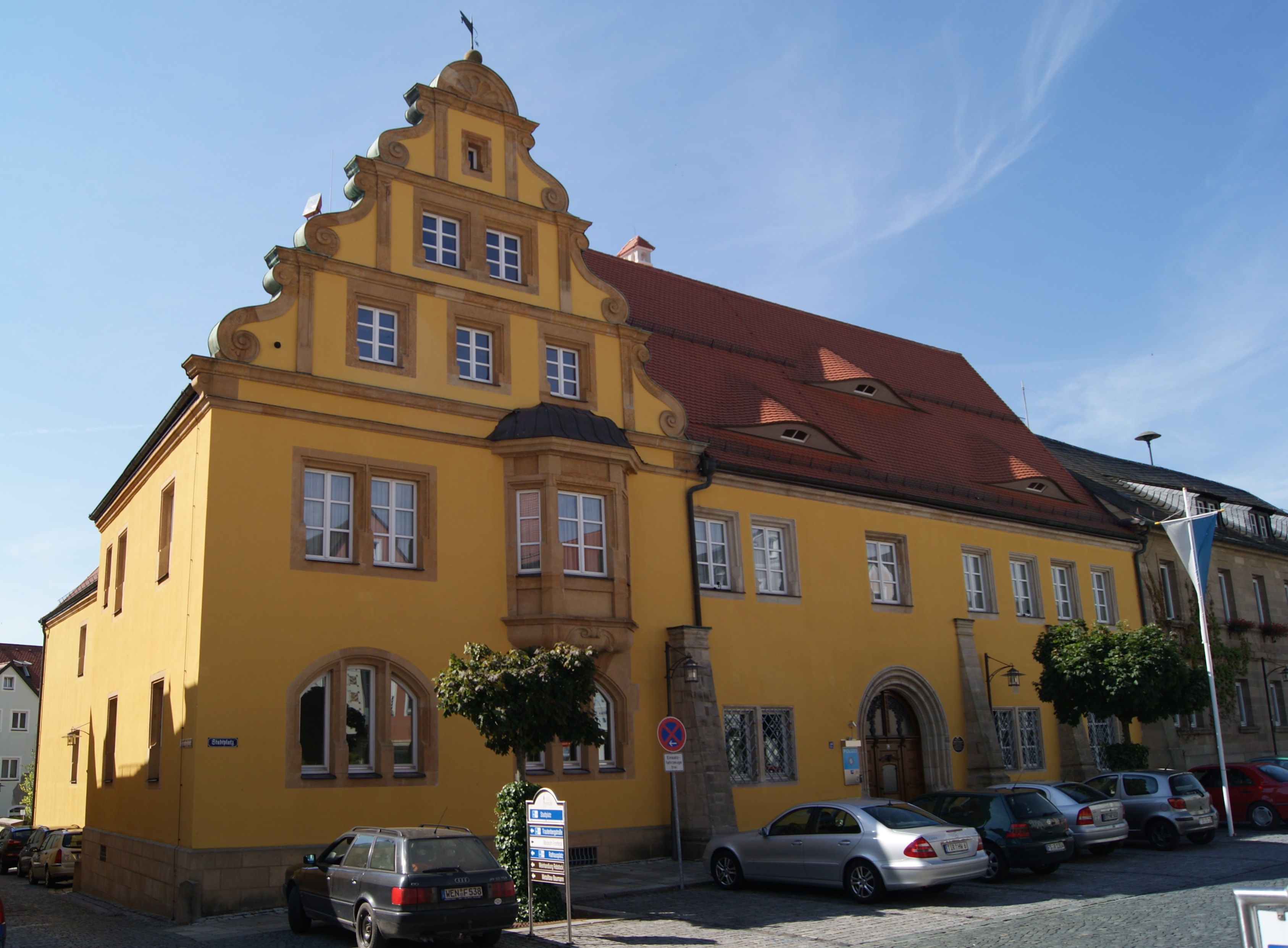 Ehemaliges kurfürstliches Kastenamt. In Renaissanceformen, innen bezeichnet 1573 und 1625, außen bezeichnet 1582, mit neuem Volutengiebel 1903 umgebaut; Dreiflügelanlage zusammen mit Stadtplatz 38This is a photograph of an architectural monument.